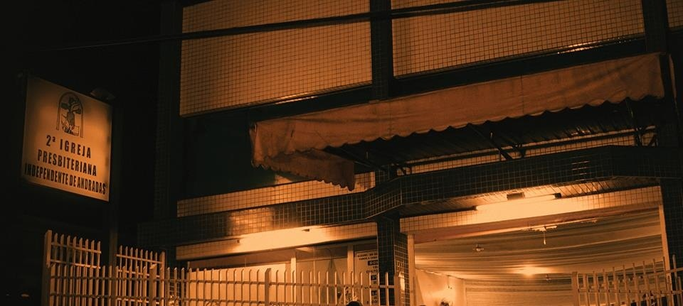 IPI de Andradas